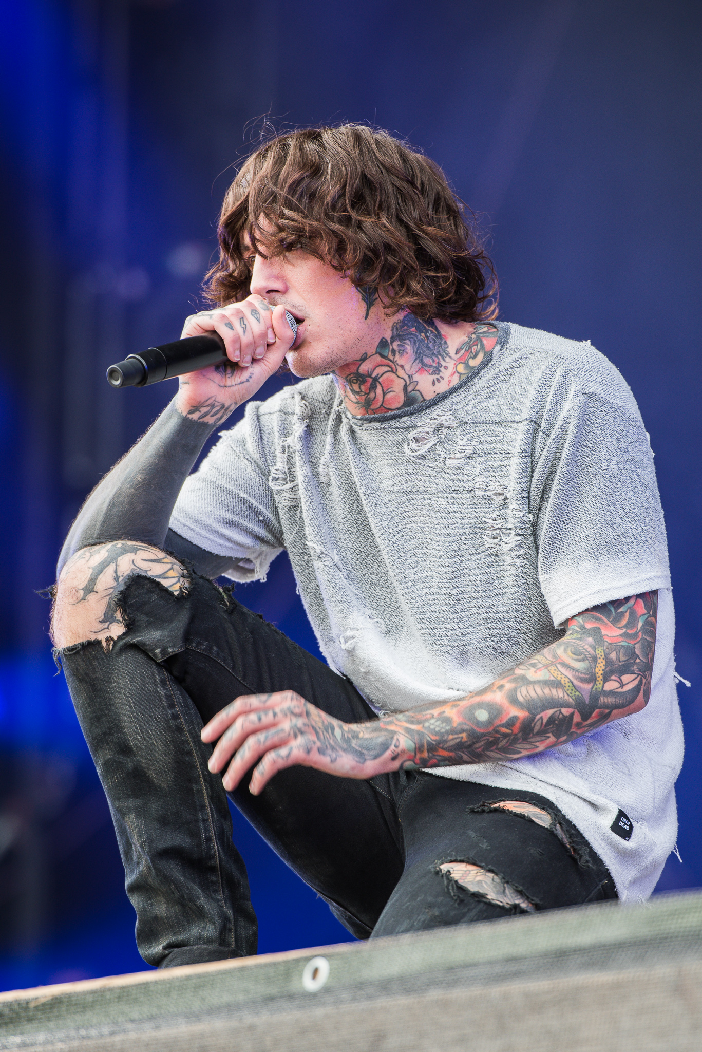 ARGO-Konzerte,Bring Me The Horizon,Festival,Konzert,Livekonzert,Livemusik,Musik,Oliver Scott Sykes,RiP,Rock im Park 2016,Seat Zeppelin Stage